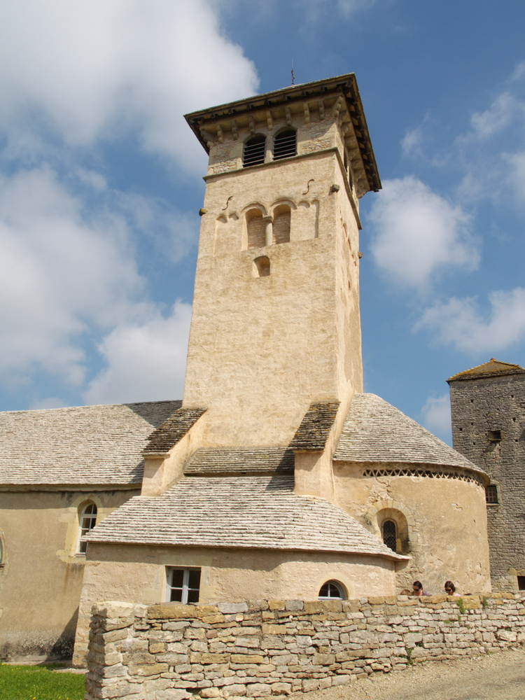 Blanot (Saône-et-Loire, Bourgogne). Église St. Martin (XI-XIIe siècles)